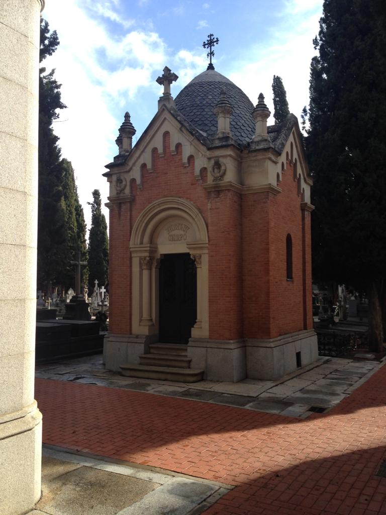 Cementerio Viejo de Alcalá de Henares. Panteón Familia del Campo